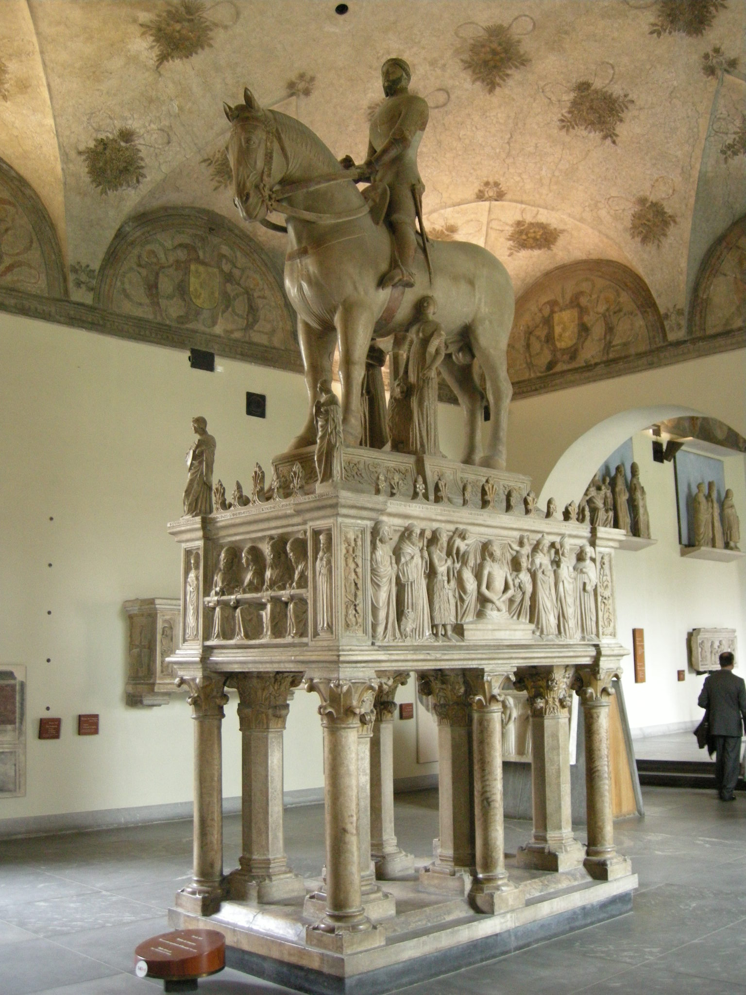 Monument to Bernabò Visconti (Milan)